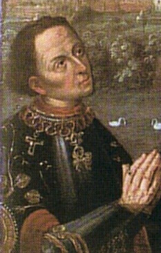 Fragment uit zeventiende-eeuws schilderij van onbekende schilder. Het origineel staat op